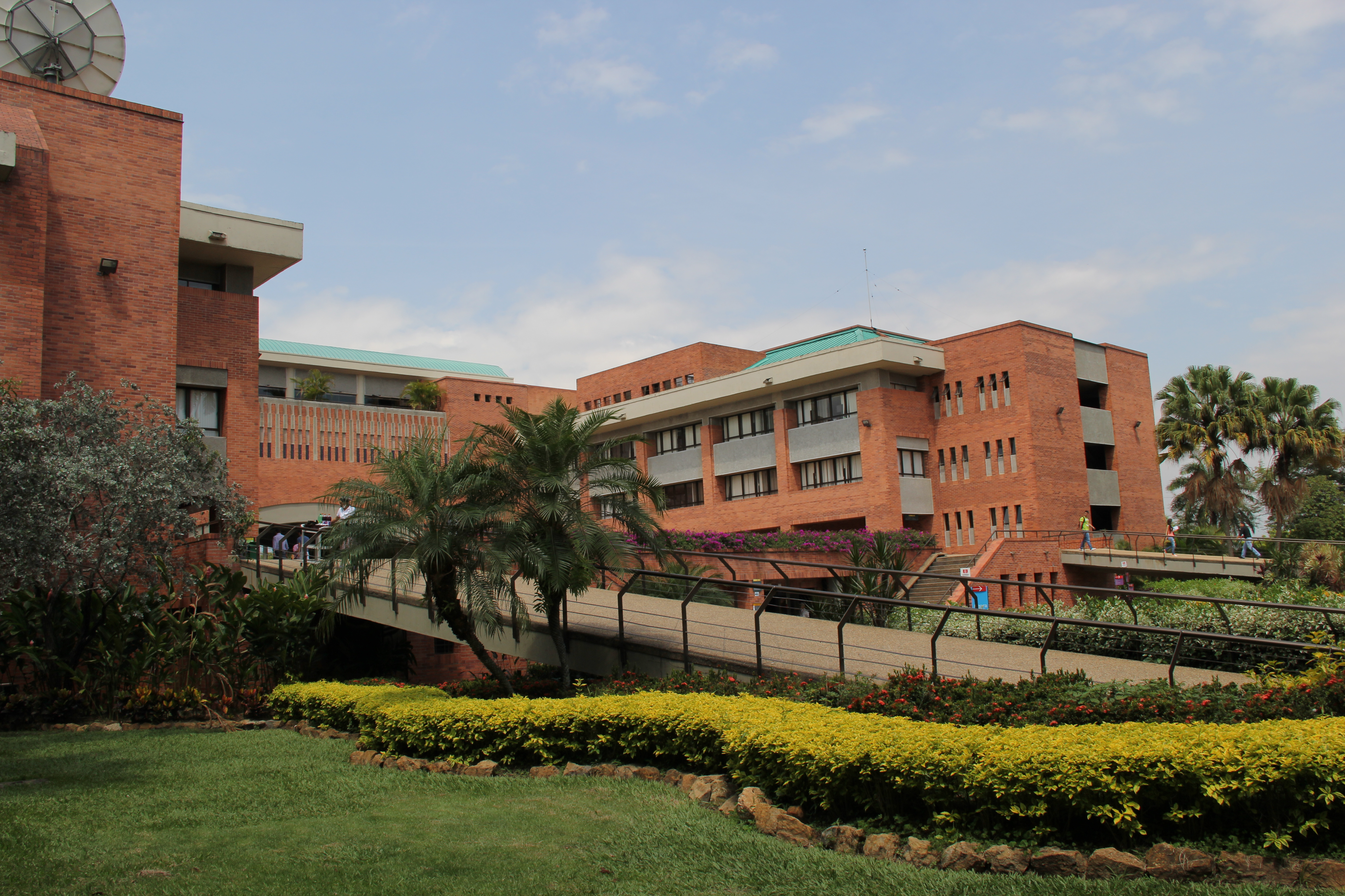 Foto del Campus Valle del Lilí de la Universidad Autónoma de Occidente